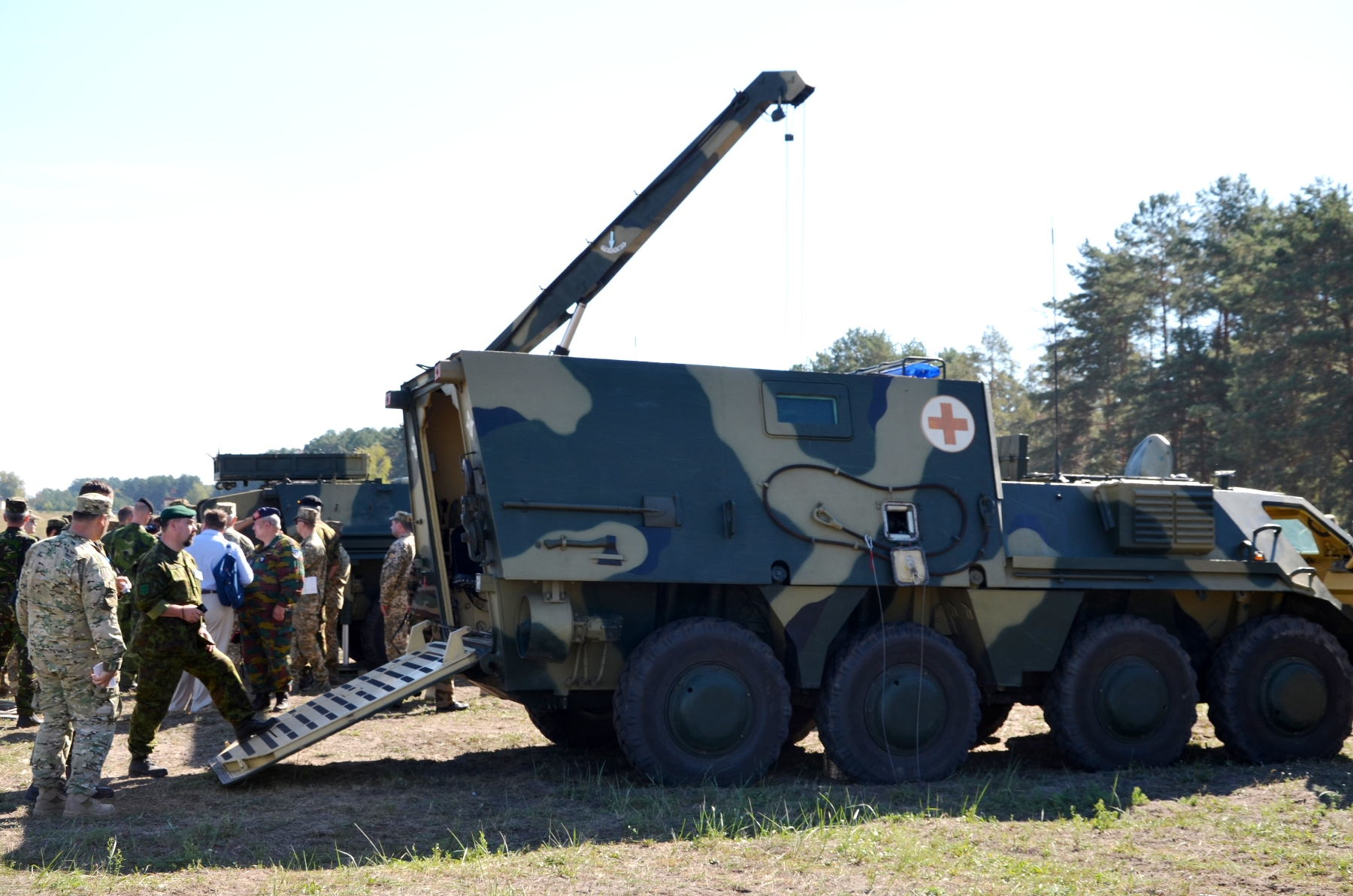 понад 50 представників 30 держав-учасниць ОБСЄ і 20 членів Київської асоціації військових аташе відвідали 169 навчальний центр Сухопутних військ Збройних Сил України (смт Десна, Чернігівської області), де ознайомилися із новими типами зброї та військової техніки, які були прийняті на озброєння української армії протягом останніх років. Зокрема, на військовому полігоні центру відбулася демонстрація бронетранспортера БТР-4Е, командирського варіанту бронетранспортера БТР-4К, броньованої ремонтно-евакуаційної машини БРЕМ-4РМ, броньованої санітарно-евакуаційної машини БММ-4С, 120-мм міномету М120-15 «Молот». Також під час заходу офіцери Центру розвитку та супроводження матеріального забезпечення Збройних Сил України представили інспекторам ОБСЄ зразки військової форми одягу, спорядження, засобів індивідуального захисту та сучасні набори харчування українських воїнів. Співробітник центру попередження конфліктів ОБСЄ Роберт Мосінков, який був обраним речником групи відвідувачів, подякував офіцерам Управління верифікації Генерального штабу ЗС України за відкритість, оперативність та надану змістовну інформацію, що цікавила інспекторів. — Захід пройшов вдало і повністю відповідав Віденському документу. Ми задоволені тим, яку відкритість виявила Україна. Це є черговим внеском у справу розбудови довіри і безпеки між державами, — наголосив Роберт Мосінков.